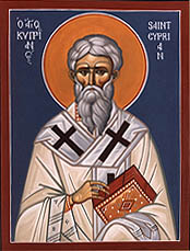 Saint Cyprian